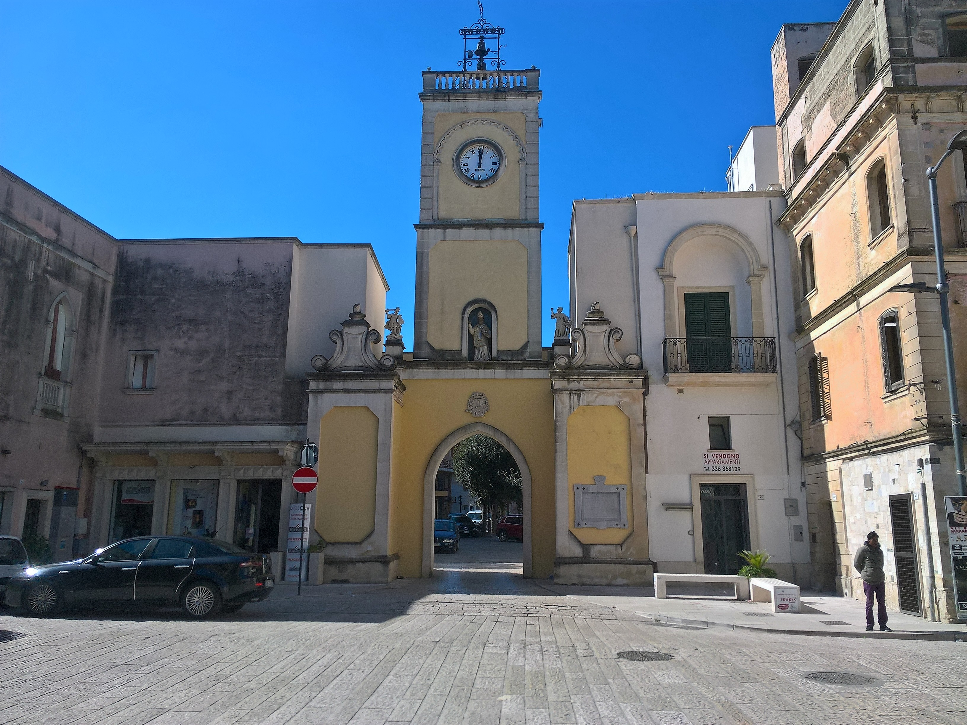 Porta San Nicola